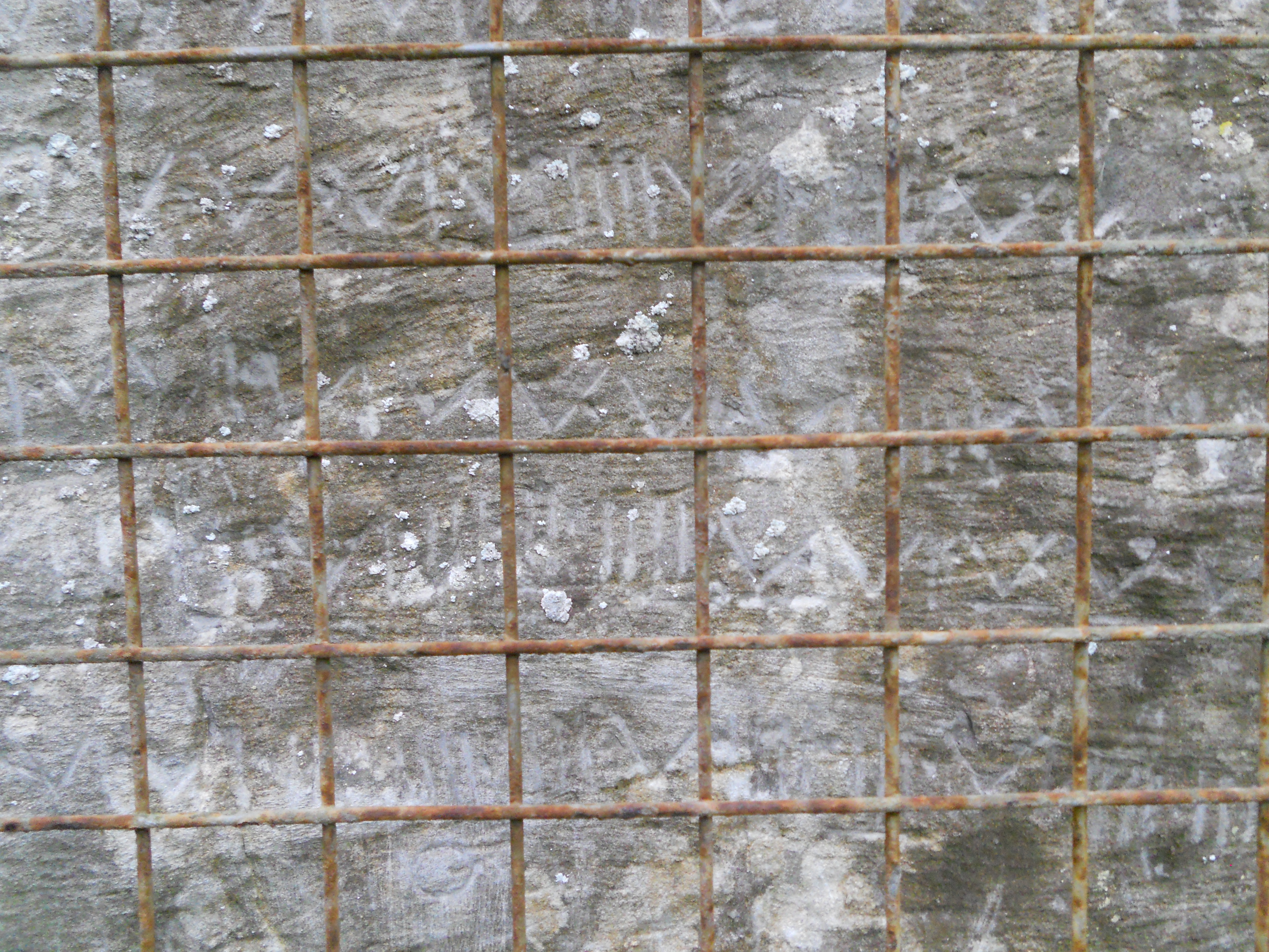 Ecritures de Maizeret derrières leur grille de protection .